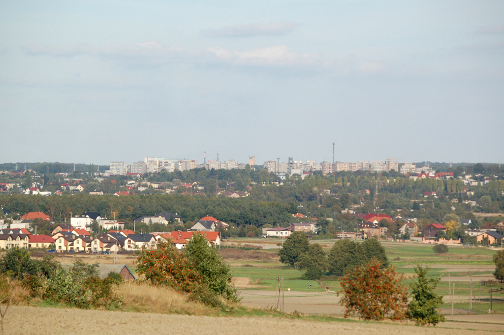 Katowice-Osiedle Odrodzenia od strony Mikołowa